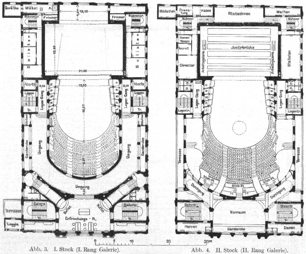 Deutsches Schauspielhaus, Neubau 1901, Grundriss des Ersten und Zweiten Obergeschosses mit I. und II. Rang